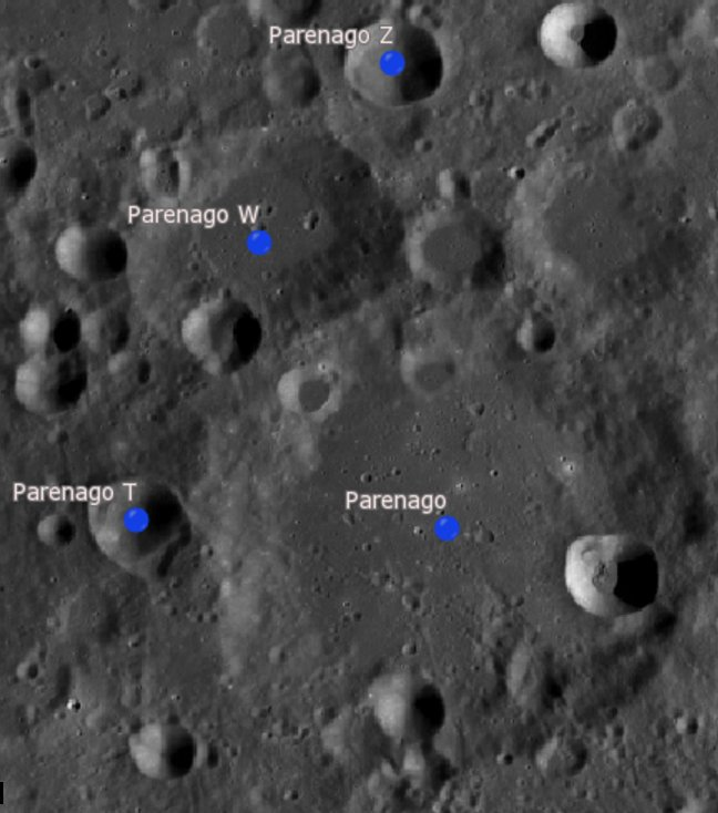 Cráter lunar Parenago. Cráteres satélite. (Imagen LRO)